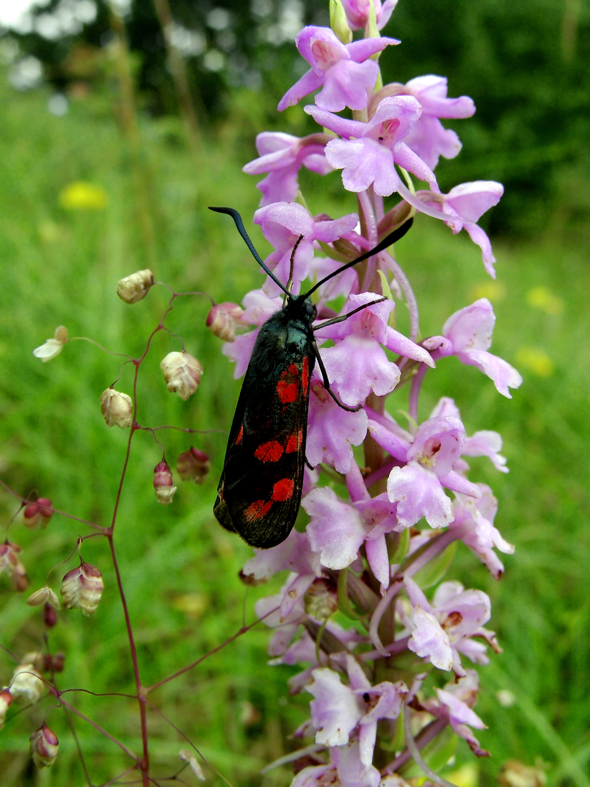 Beschreibung: Sechsfleck-Widderchen oder Blutströpfchen (Zygaena filipendulae) auf Mücken-Händelwurz (Gymnadenia conopsea); links: Gemeines Zittergras (Briza media) Aufnahmedatum: 23. Juni 2007 Ort: Ziegenberg Fotograf: ArtMechanic